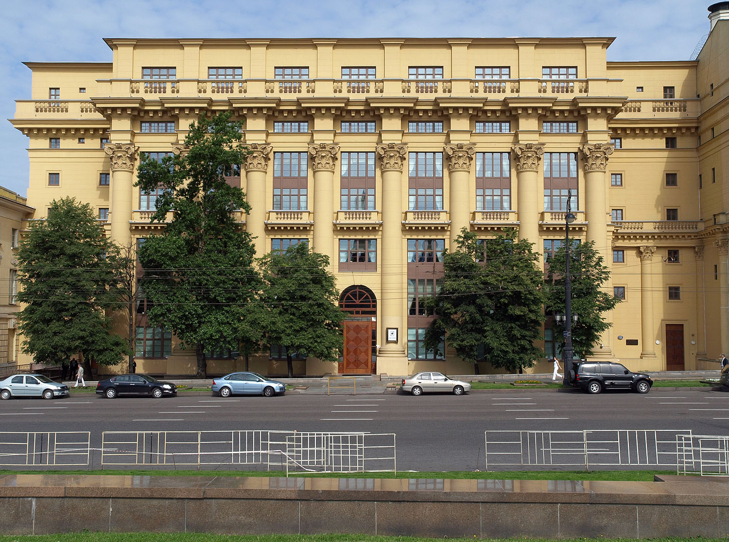 Mokhovaya Street, Zholtovsky bldg. Moscow